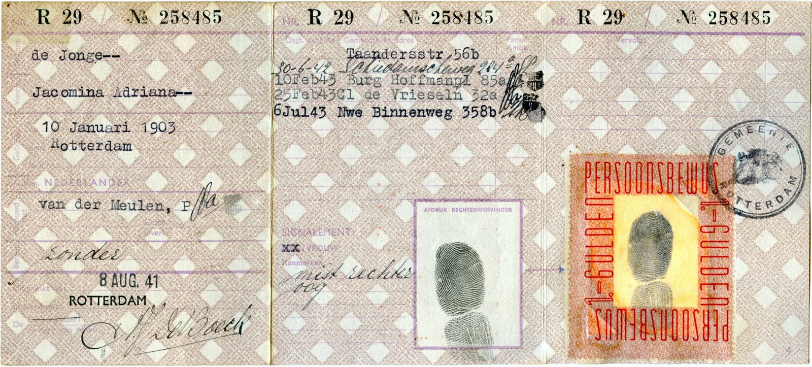 Binnenzijde van een persoonsbewijs, afgegeven op 8 augustus 1941